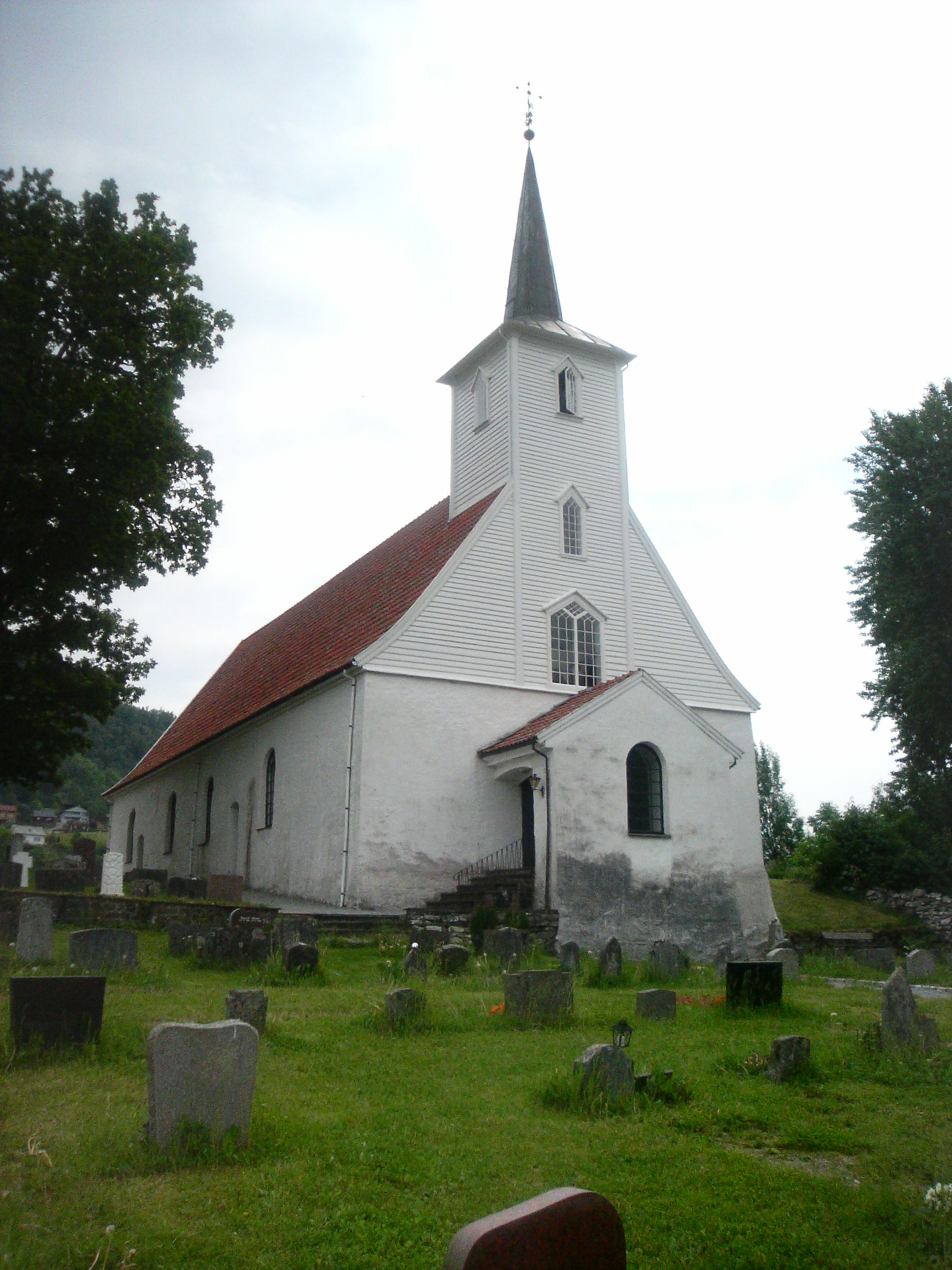 Hosanger kirke